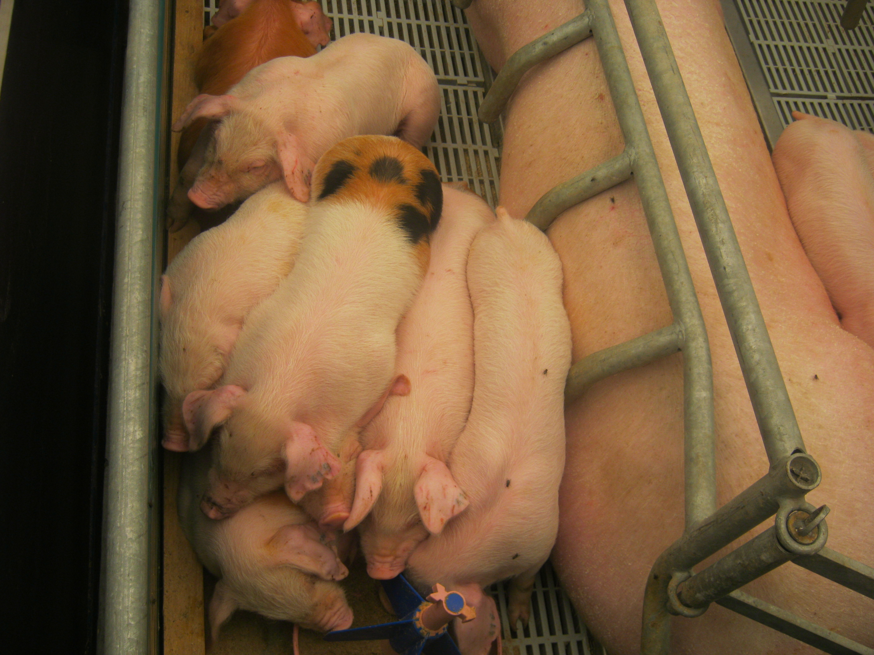 AgroBalt 2012